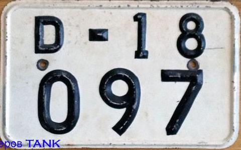 Задний дипломатический автомобильный номер СССР образца 1959 года